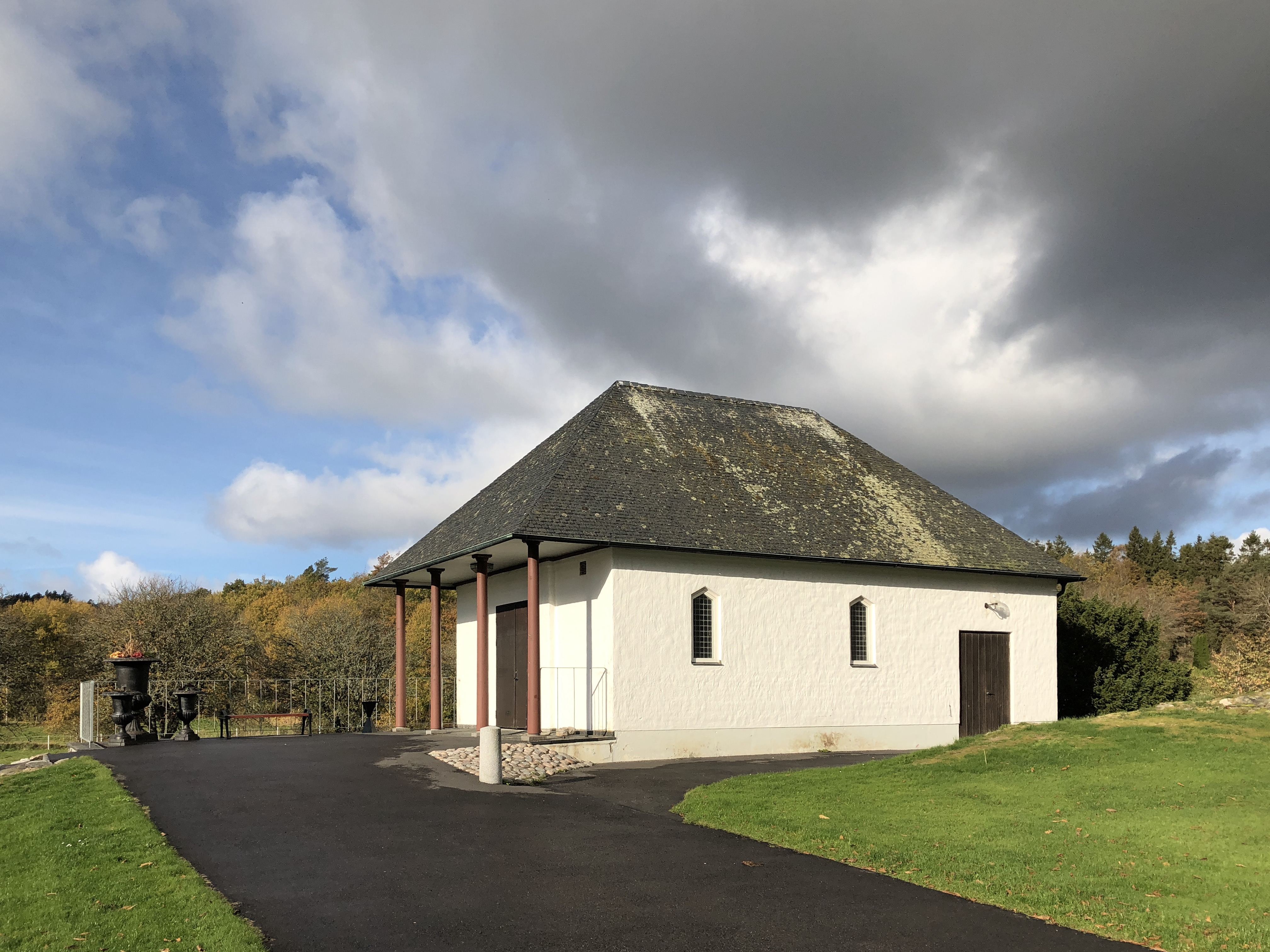 Gravkapell, Släps kyrka. Byggnadsår 1954. Arkitekt: Axel Forssén.